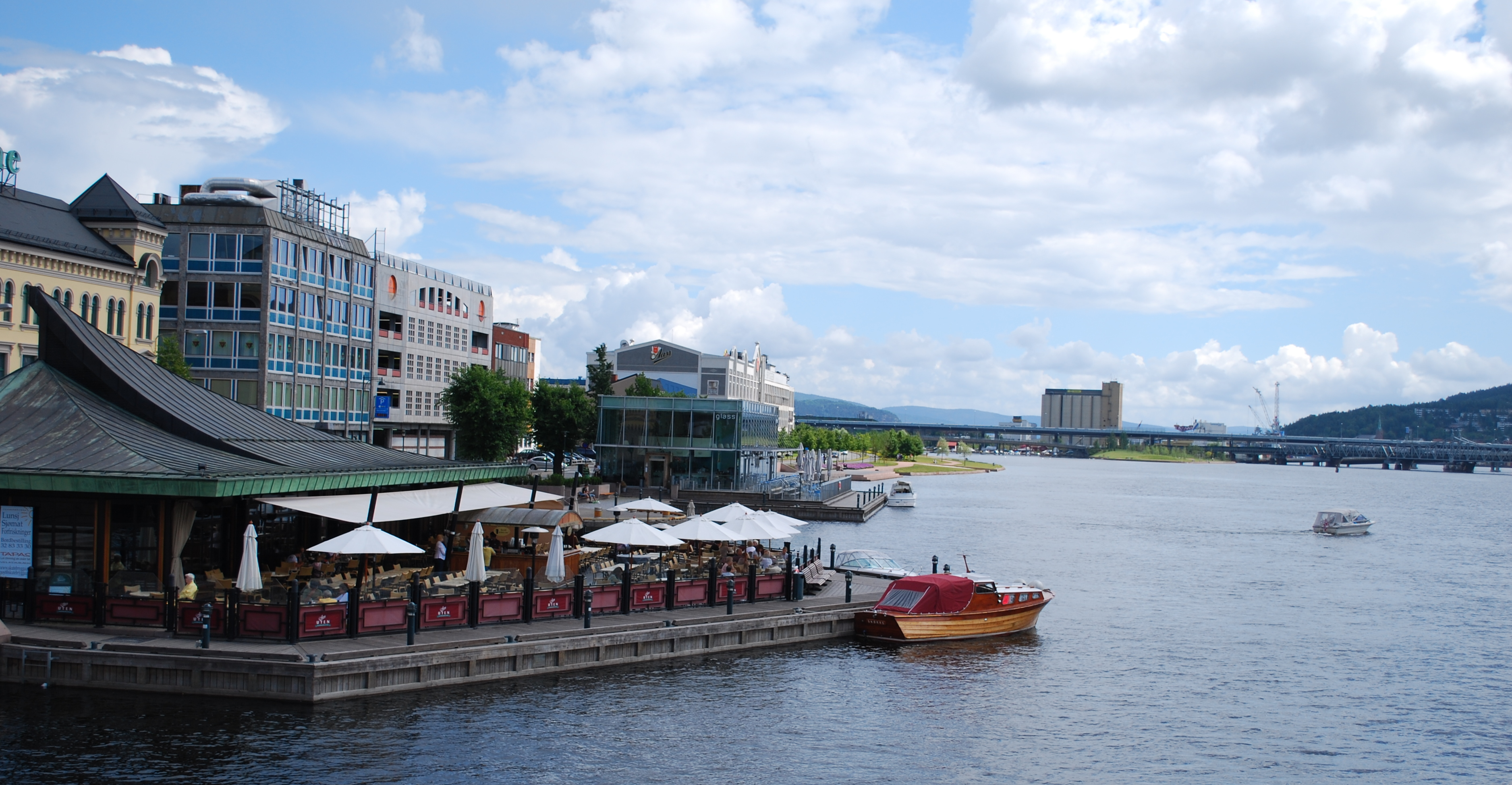 Sjøfronten langs østsiden av Drammenselva mellom Bybrua og Drammensbrua